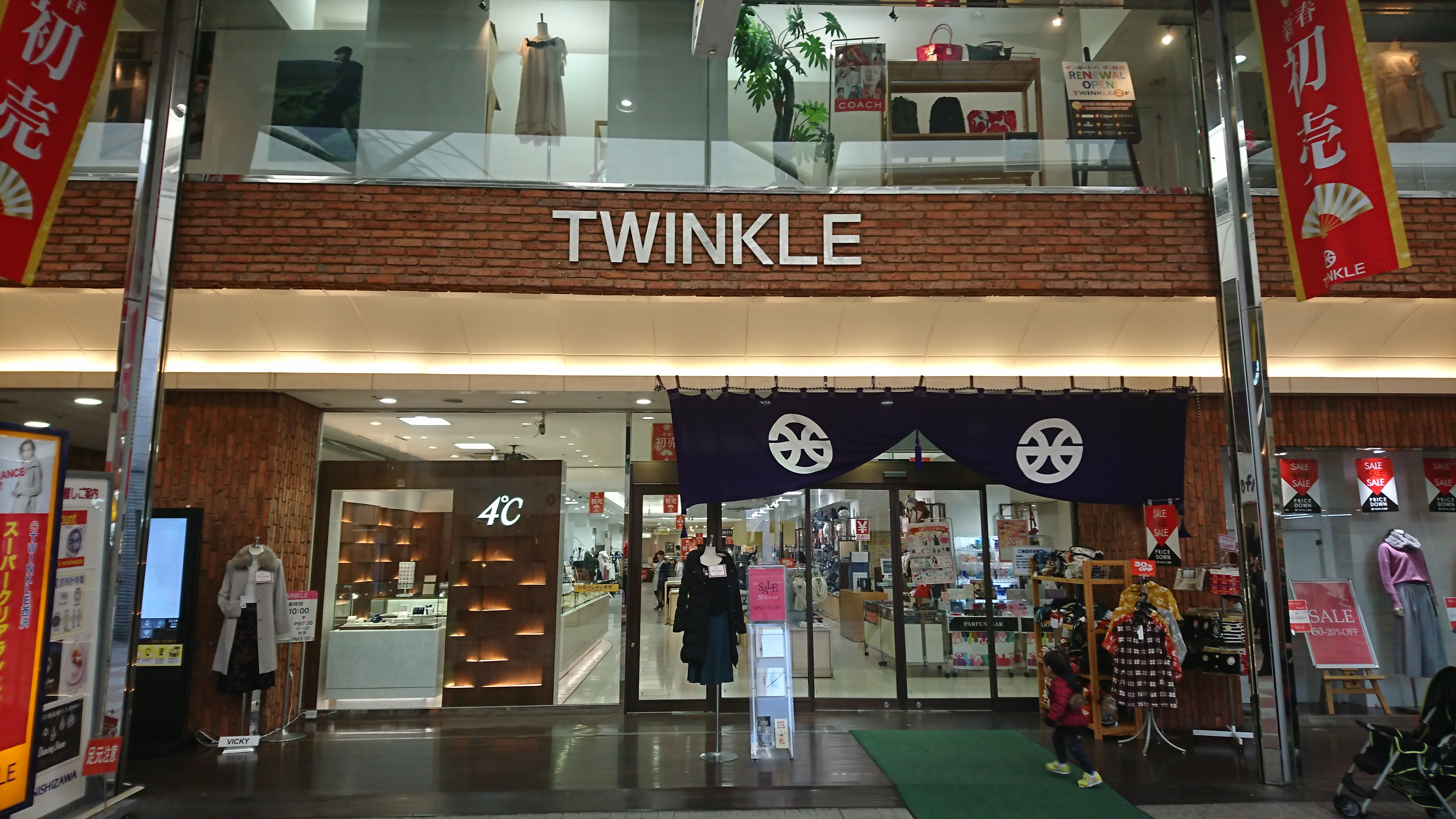 トゥインクル西沢店舗正面画像